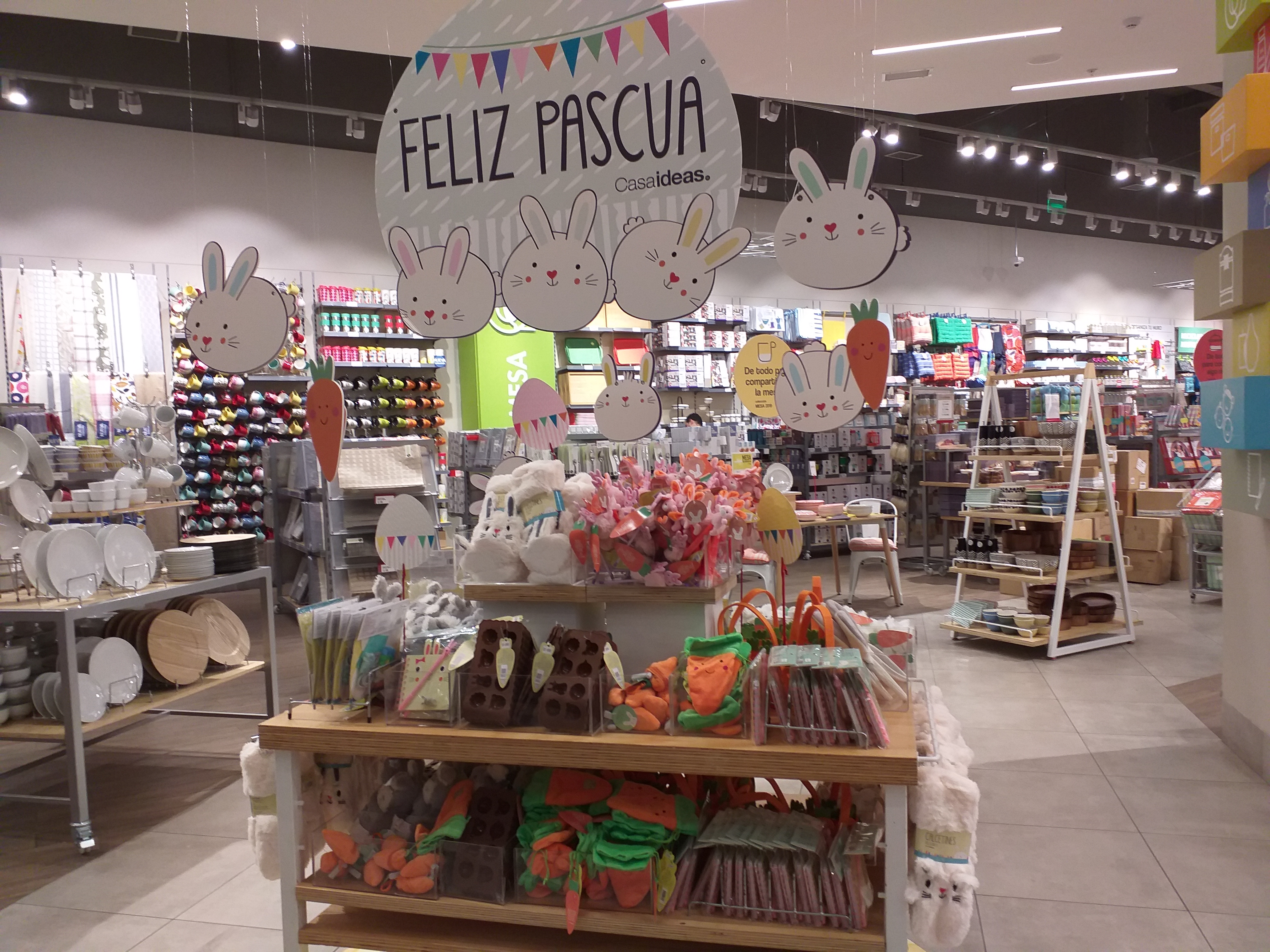 Pascua 2019